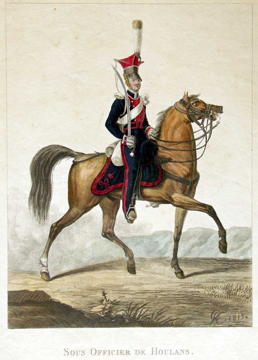 Унтер-офицер Уланских полков